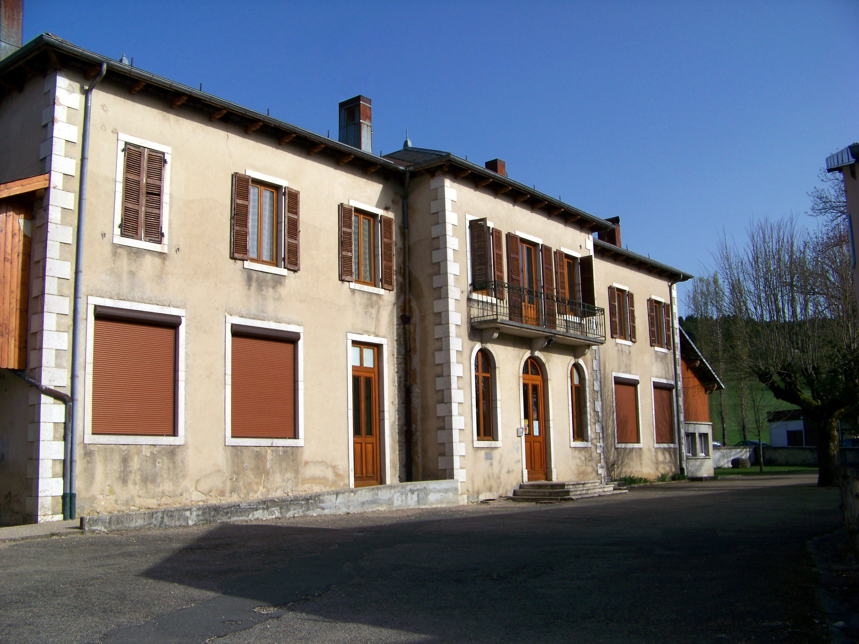 Photo de la mairie de la commune de Lantenay (Ain)